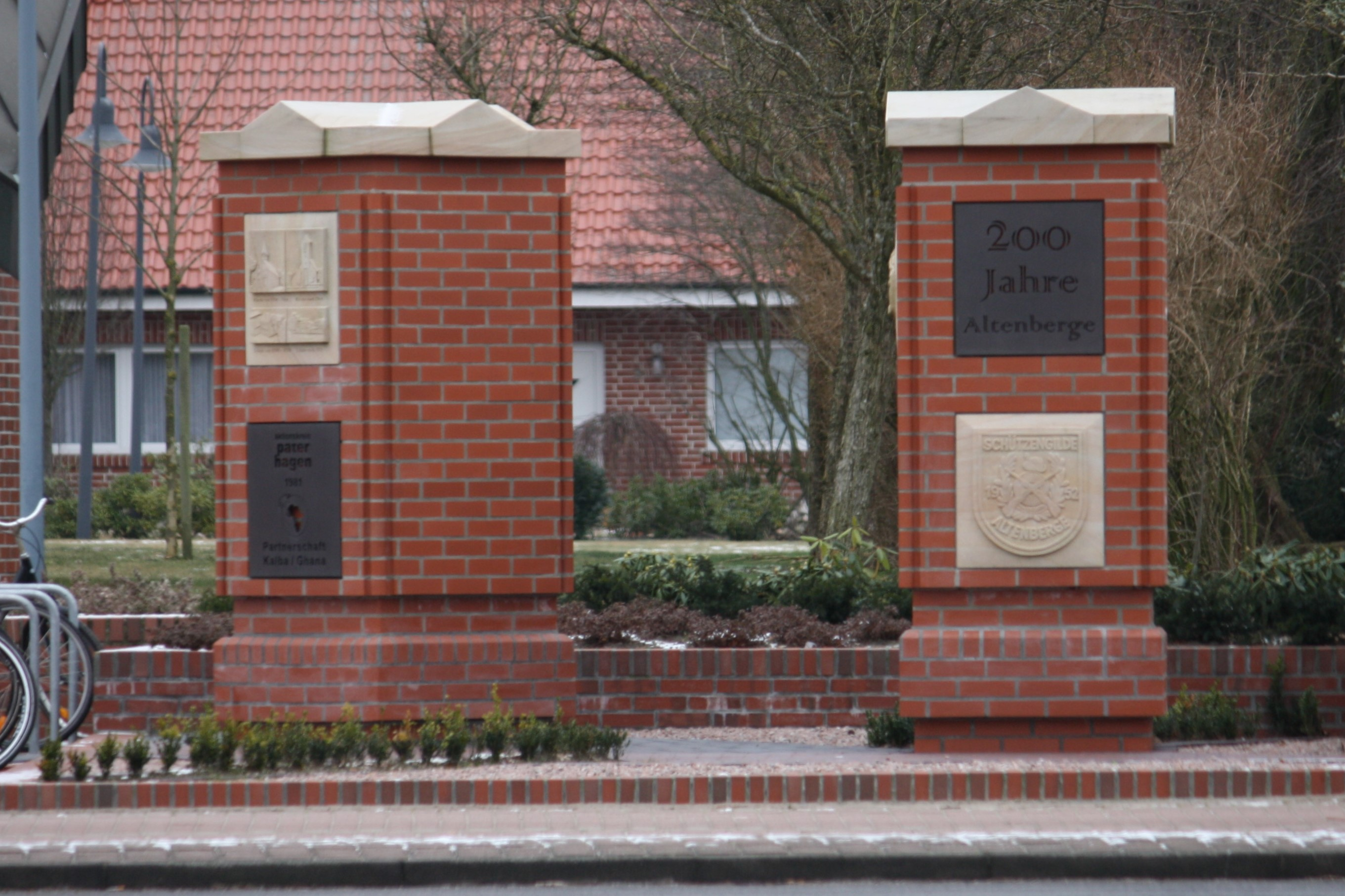 Jubiläumssäulen zum 200 jährigen bestehen des Ortes Altenberge